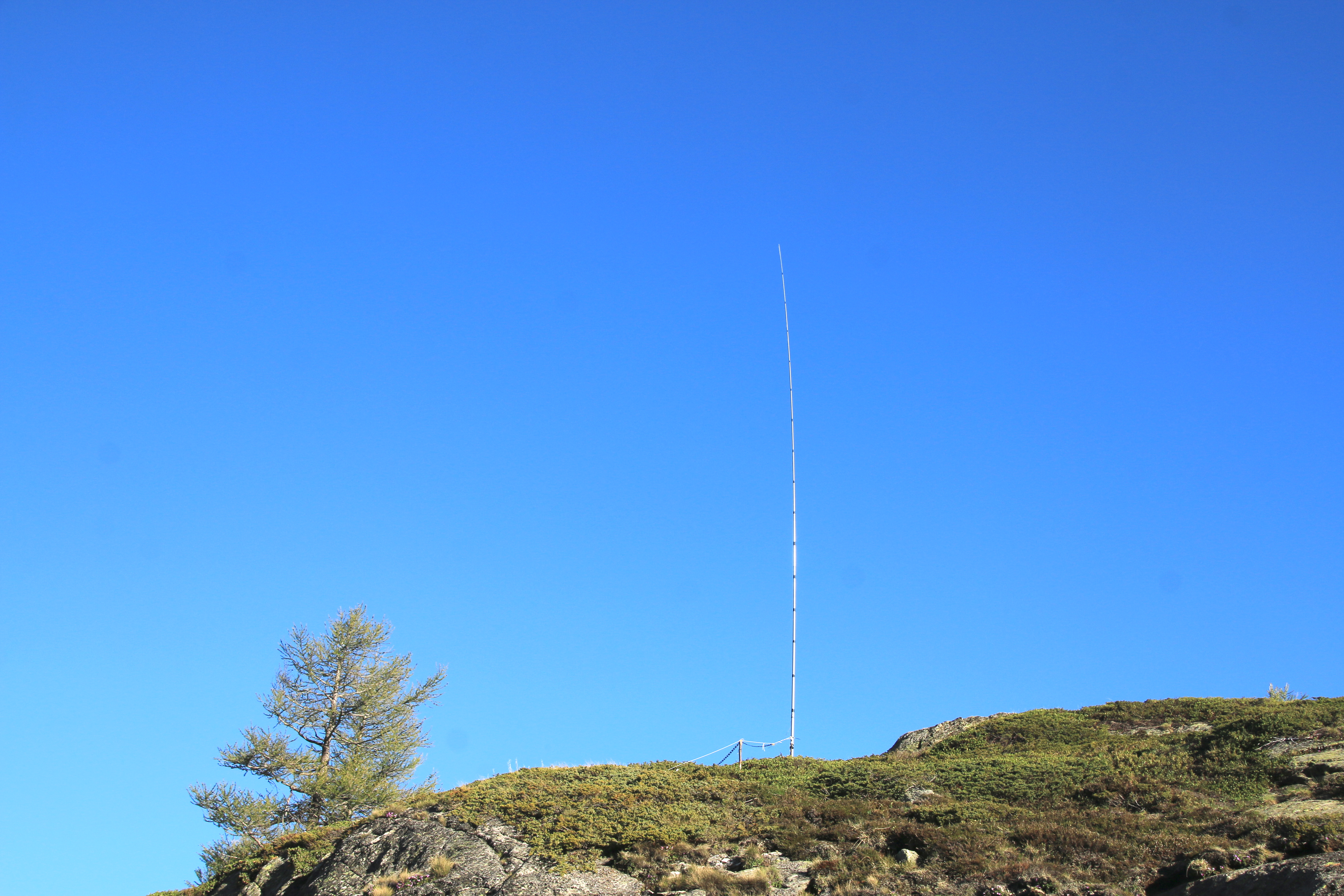 10 Meter hohe Vertikalantenne für 20 Meter Wellenlänge